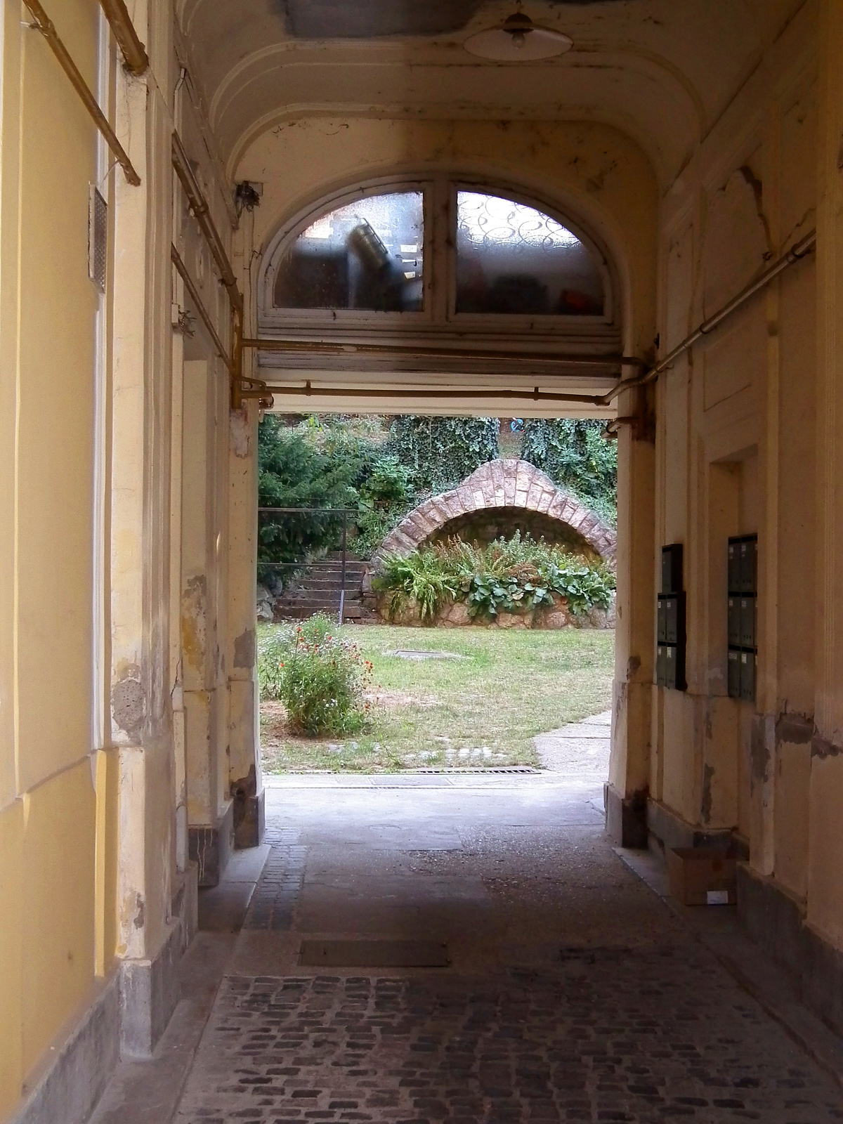 A KMP megalakulásának helye (Budapest 12, Városmajor utca 42.) This is a photo of a monument in Hungary. Identifier: 1172